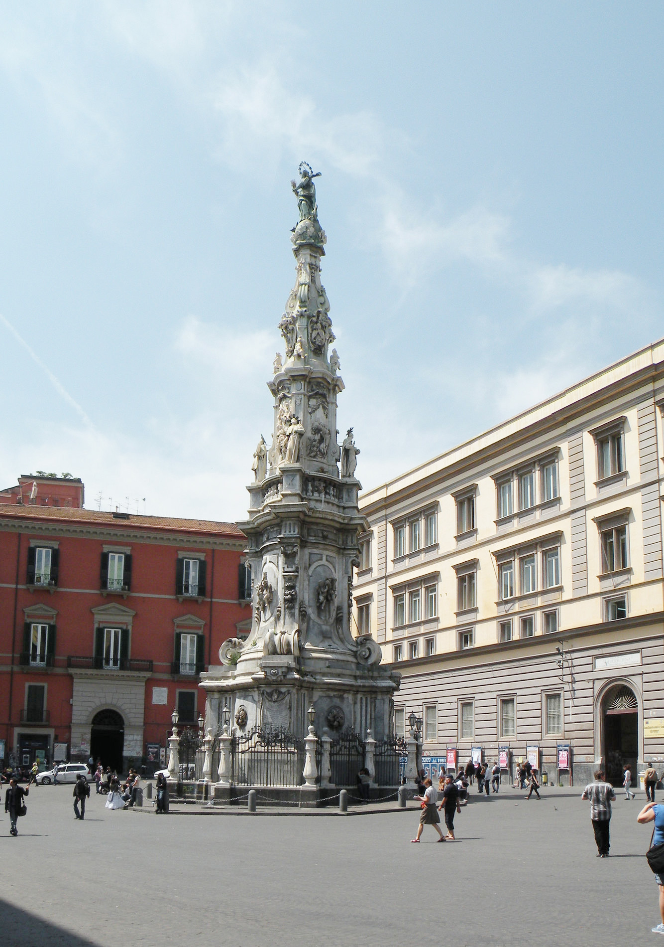 Монумент св. Доминика